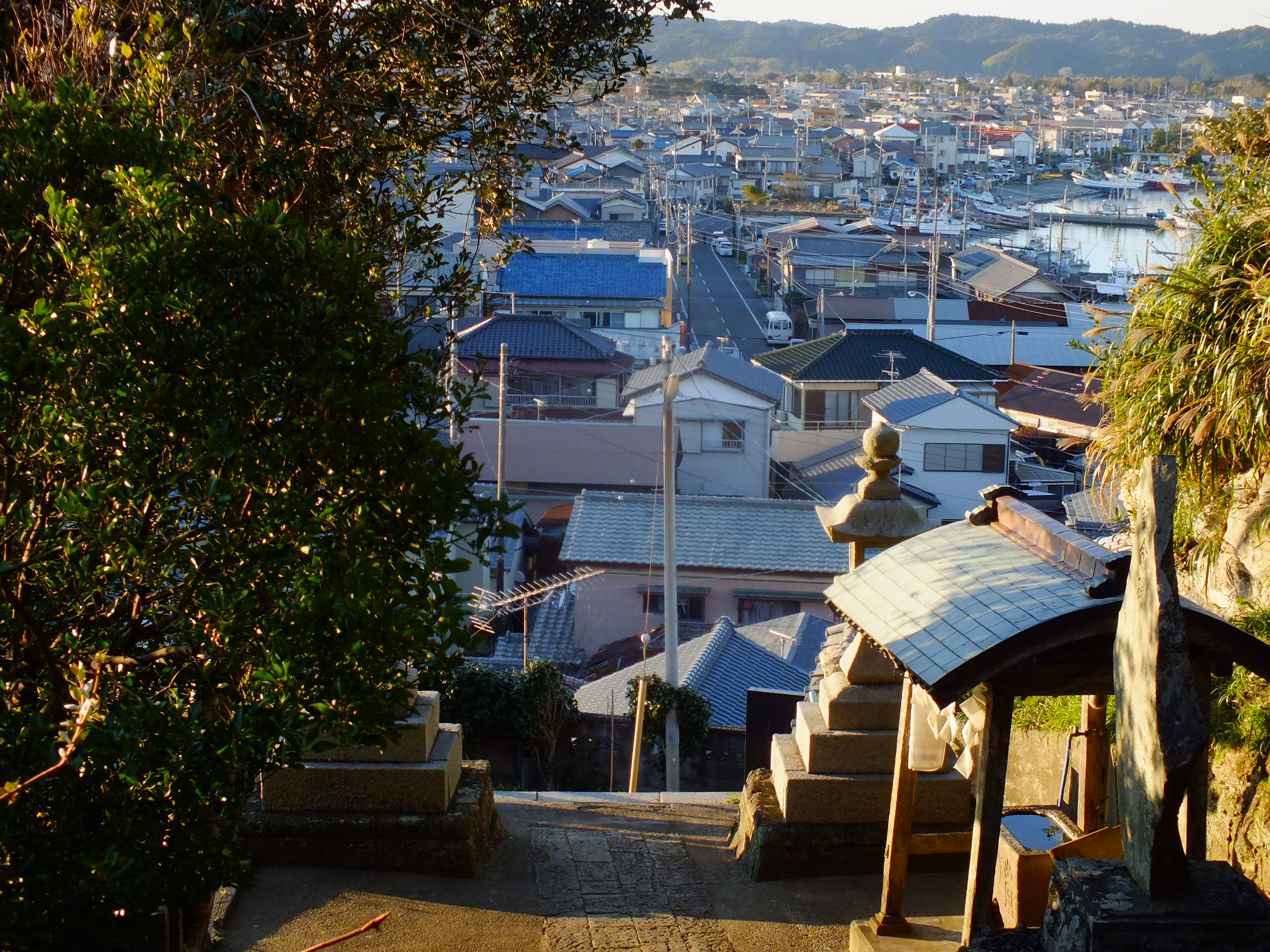 2013-11-30 Ohhara Fishing port 大原漁港、八幡岬・小浜八幡神社より